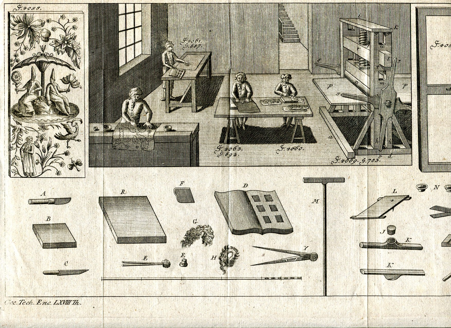 painter, Maler werkstat, Spallierer